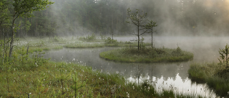 Rezerwat "Zakręt"